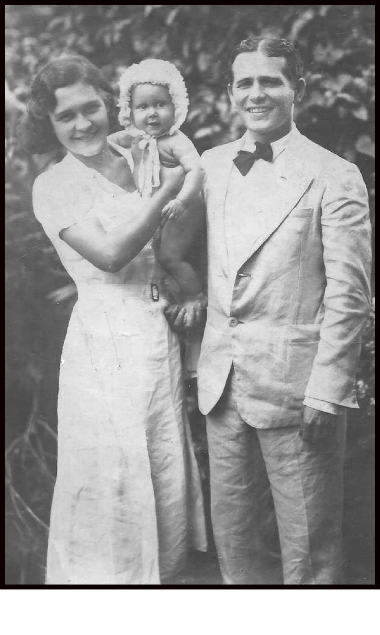 Maria Luíza Xavier de Almeida e Mello, Taciano Gomes de Mello Júnior, Taciano Gomes de Mello, respectivamente.